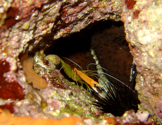 Stenopus spinosus (Crevette, Crustacé) (Croatie) (Photo personnelle)